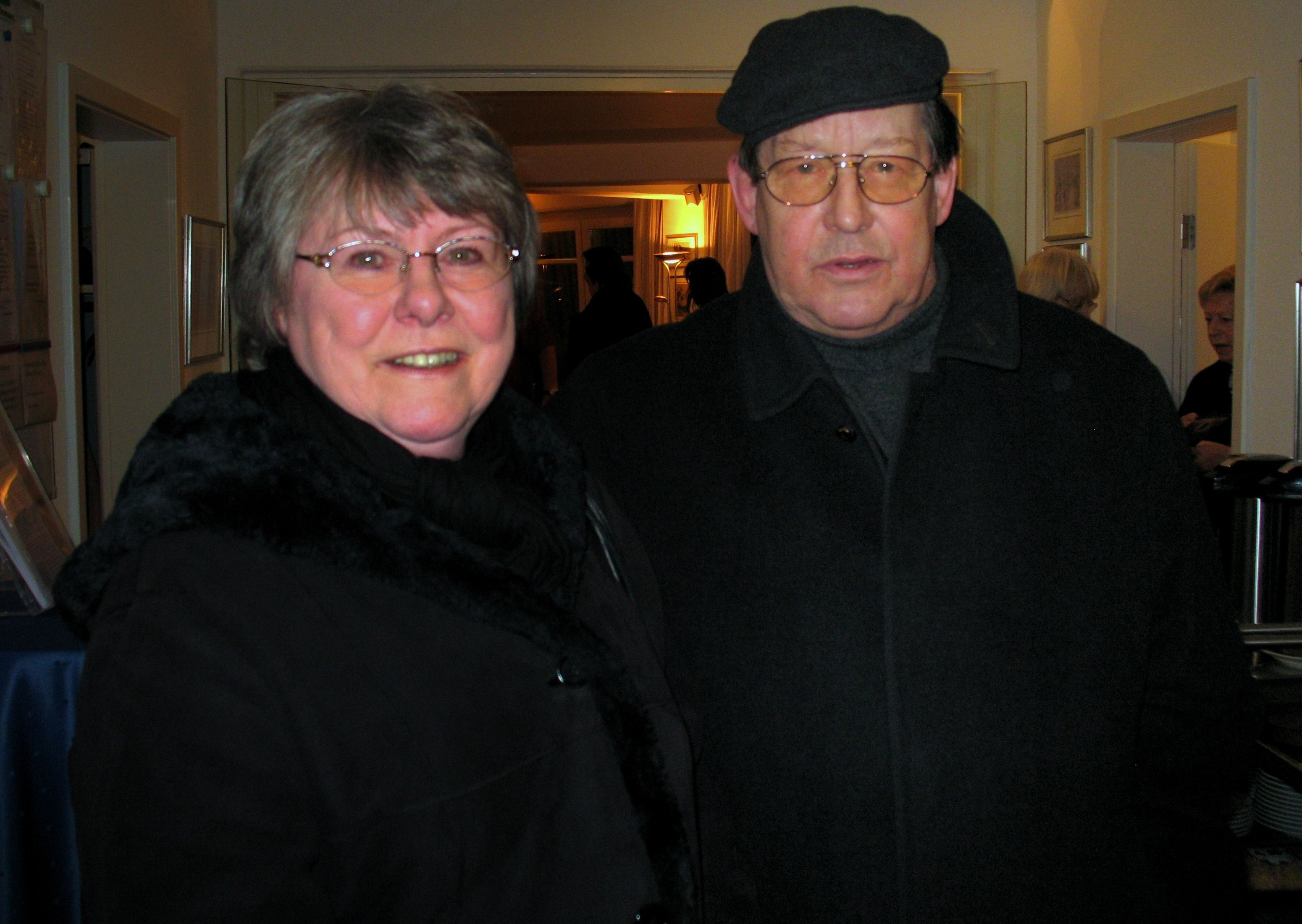 Winfried Junge mit Ehefrau Barbara bei der Trauerfeier von Ron Holloway am 17. Januar 2010